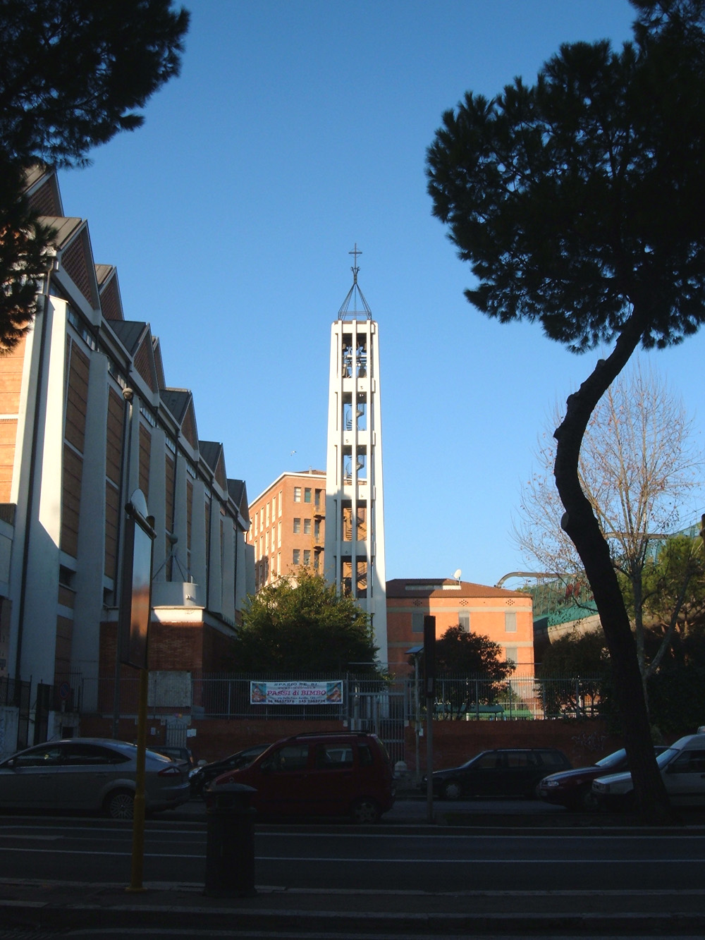 Chiesa di San Gregorio VII, a Roma, nel quartiere Aurelio. Campanile.